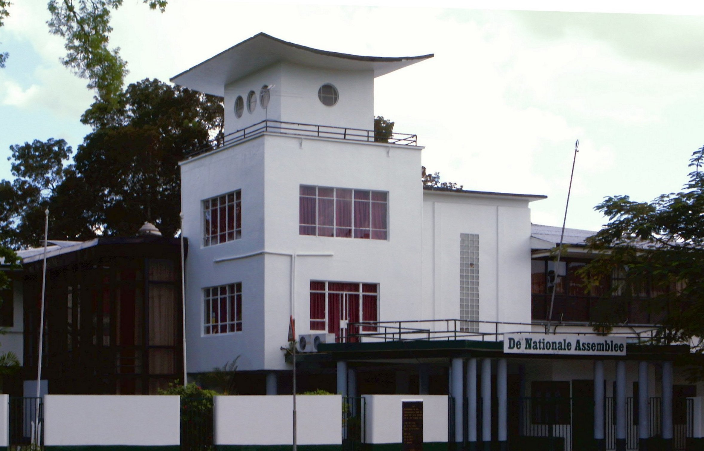 Assemblee in Paramaribo